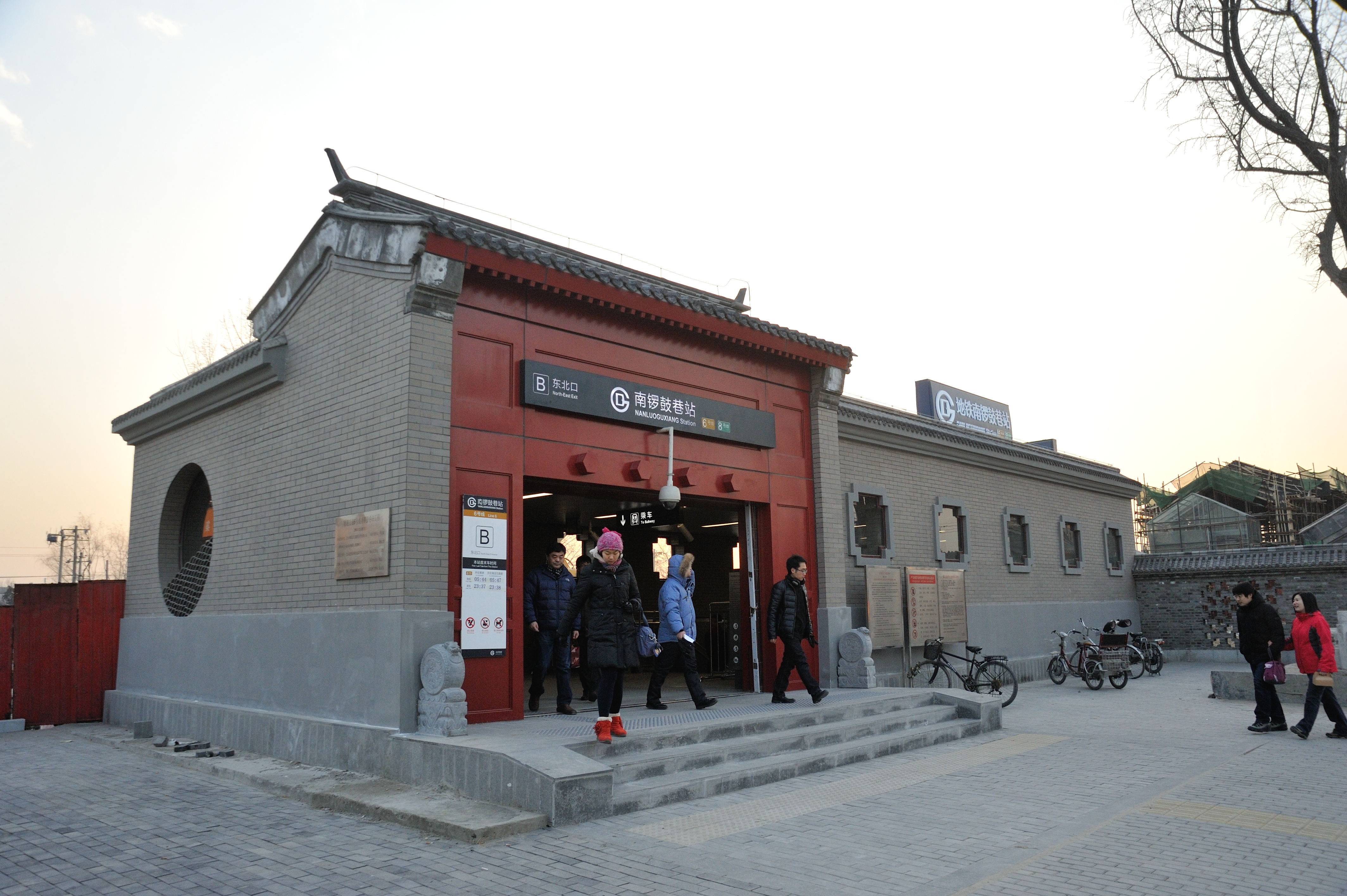 南锣鼓巷站B口